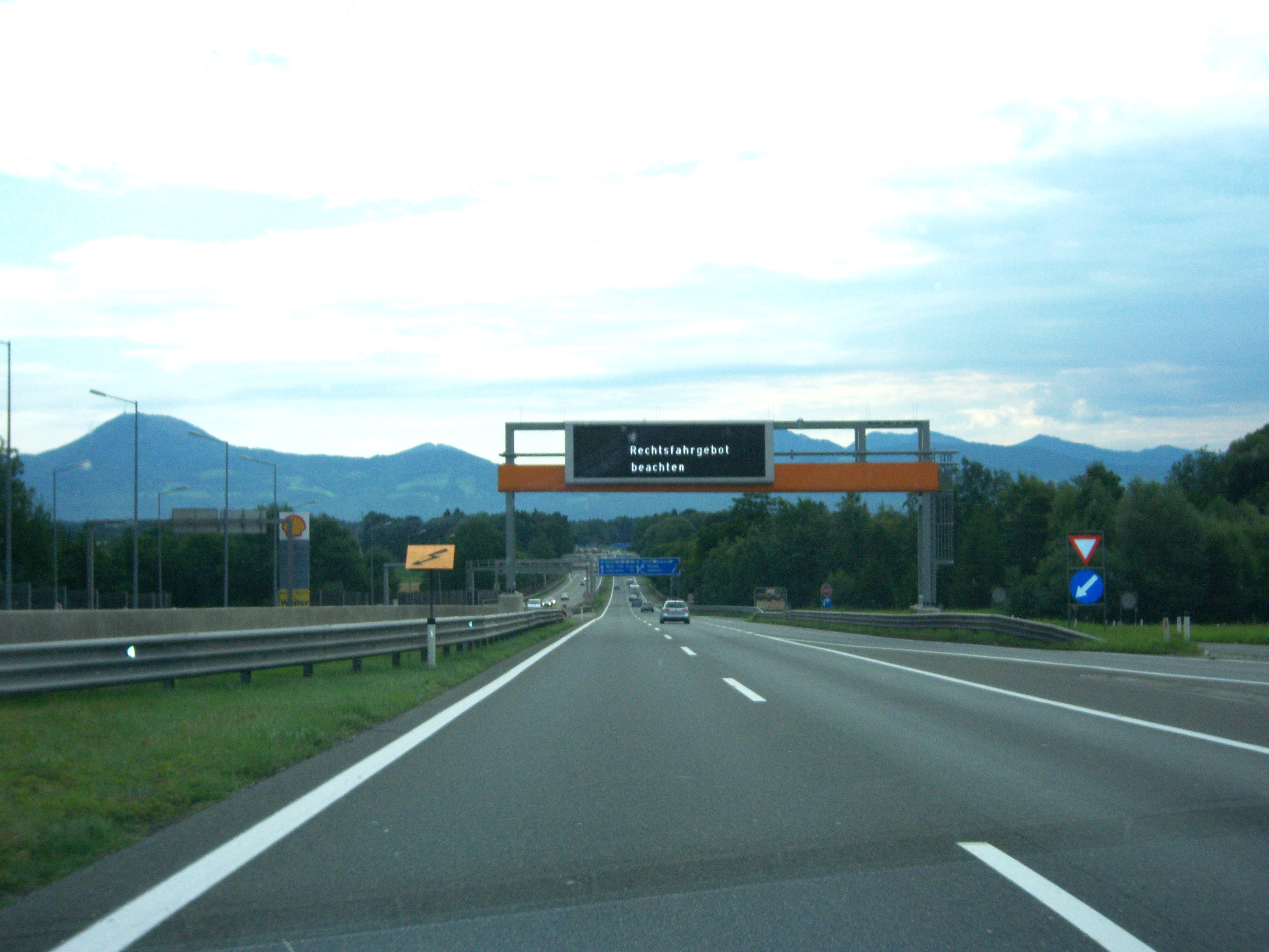 West Autobahn A1 Richtung Salzburg nach dem Grenzübergang Walserberg.